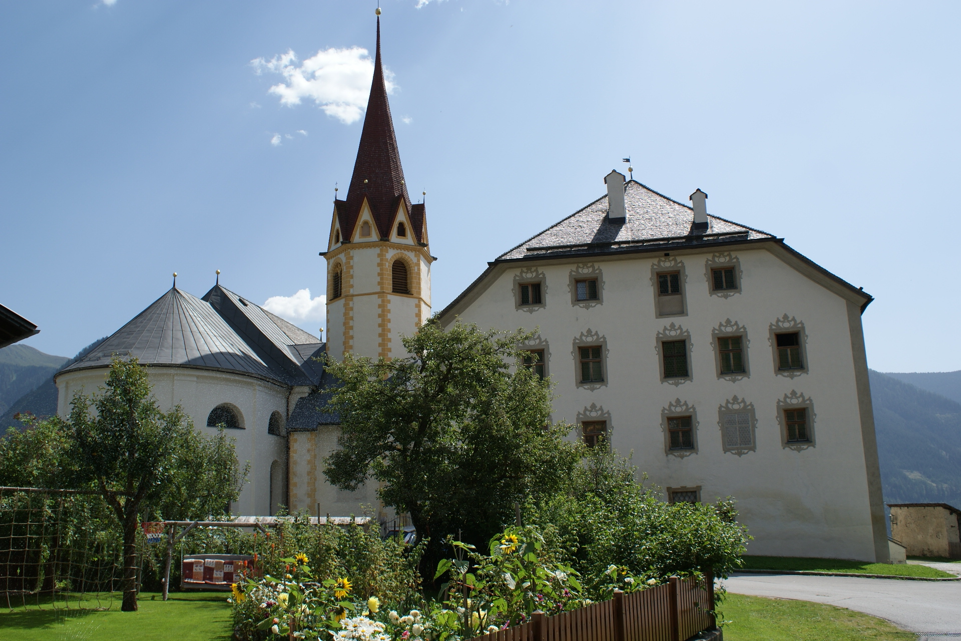 Ehemaliger Bischofssitz und Gerichtssitz der Bischöfe von Brixen im 13. Jahrhundert. Denkmalgeschützt